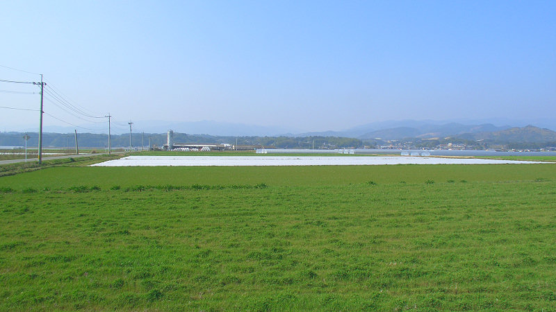 くま川鉄道湯前線ja:おかどめ幸福駅 駅周辺 ホーム上から北西側を見る。左端に見える道路を奥へ行くとja:球磨川を渡る庄屋橋に出る。 撮影者/著者/著作権保有者 : MK Products (本人がアップロード) 撮影日 : 2007/03/22 おかどめ幸福駅用にアップロードした画像です。良い画像があれば別の画像に変えてください。